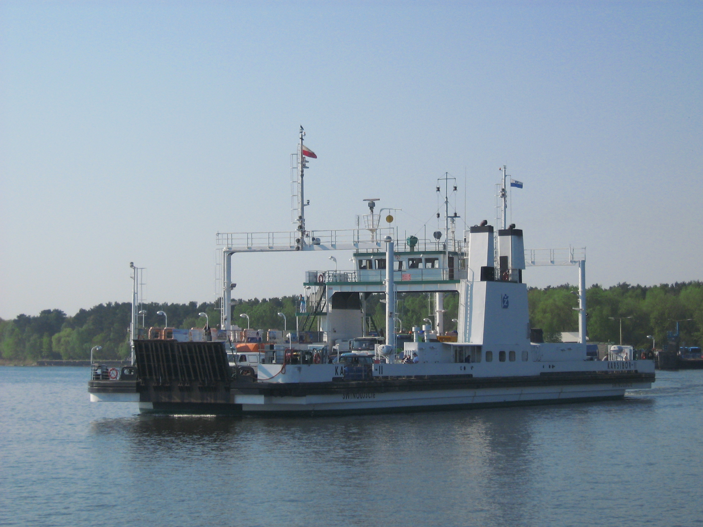 Prom pasażersko-samochodowy "Karsibór II"